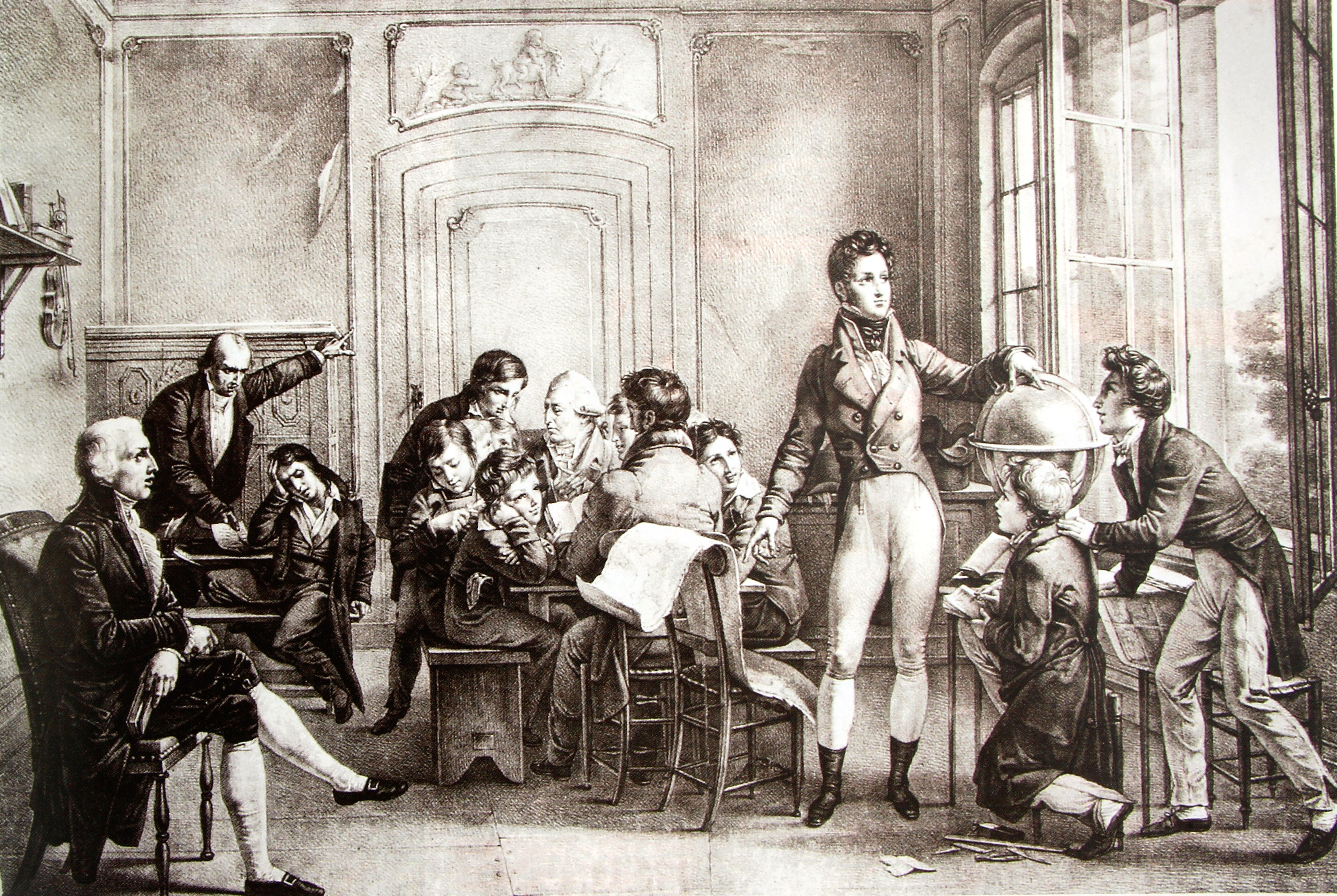 Schulszene aus dem Schloss Reichenau GR. Lehrer: Monsieur Chabos, der spätere König Louis-Philippe I.